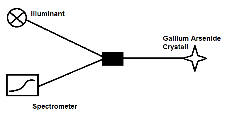 the principle structure of a fiber optical thermometer